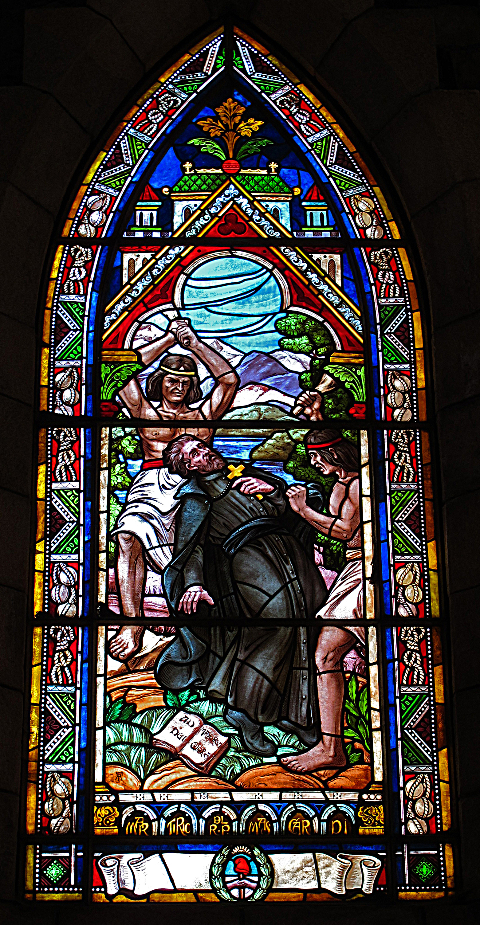 Vidriera representando el martirio del sacerdote Nicolás Mascardi en la Catedral de San Carlos de Bariloche (Argentina)